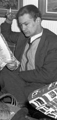 Suomalainen näyttelijä Jussi Jurkka (1930-1982) vuonna 1956.